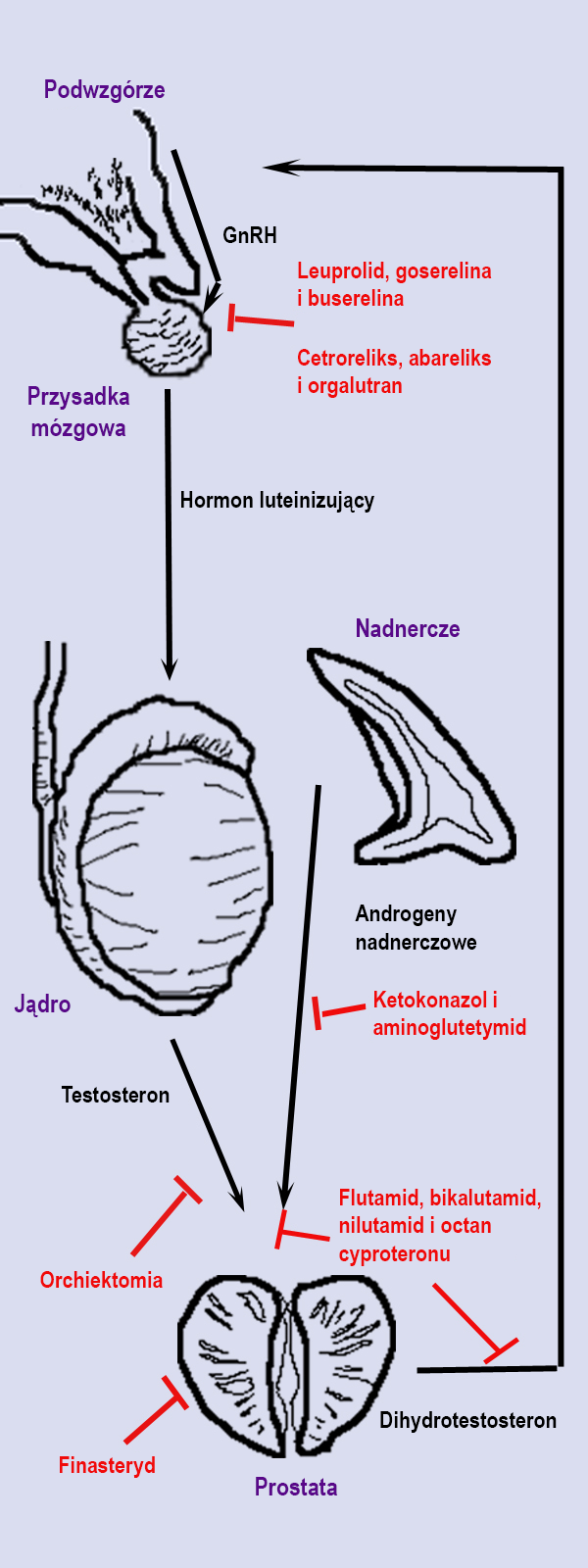 Punkty uchwytu leków stosowanych w hormonoterapii raka gruczołu krokowego.